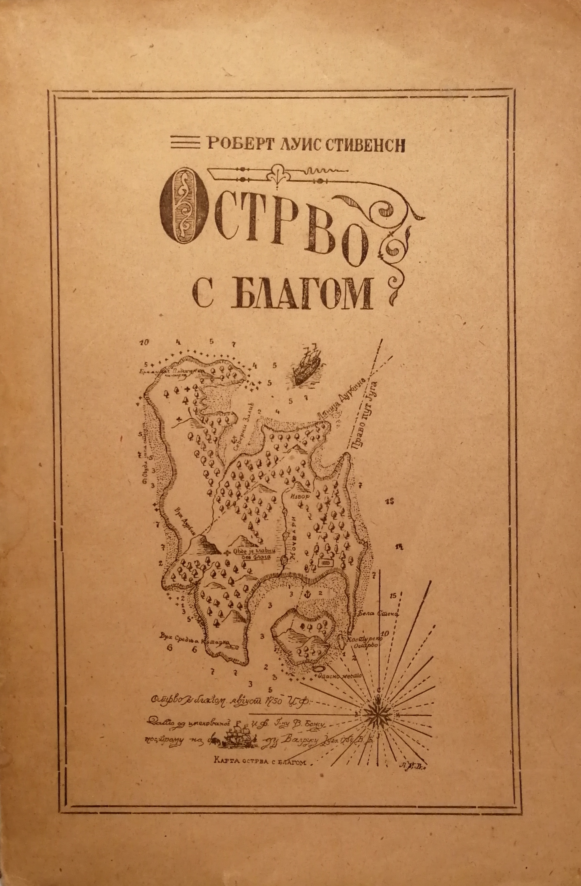 Корица књиге „Острво с благом“ Р. Л. Стивенсона у преводу Михаила Ђорђевића